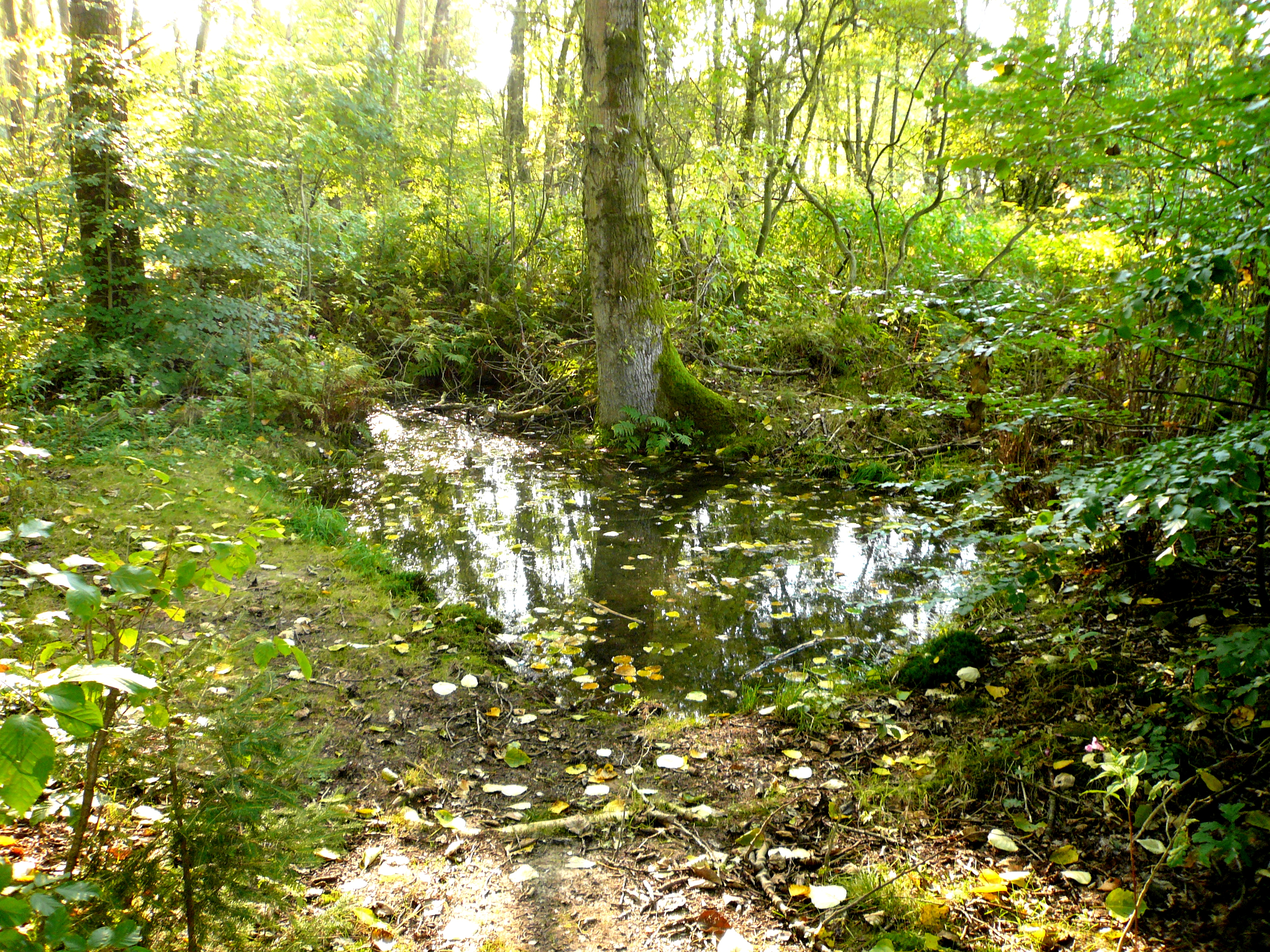 Quelltopf der Schede am Rand des Bramwaldes südwestlich von Bühren, Landkreis Göttingen